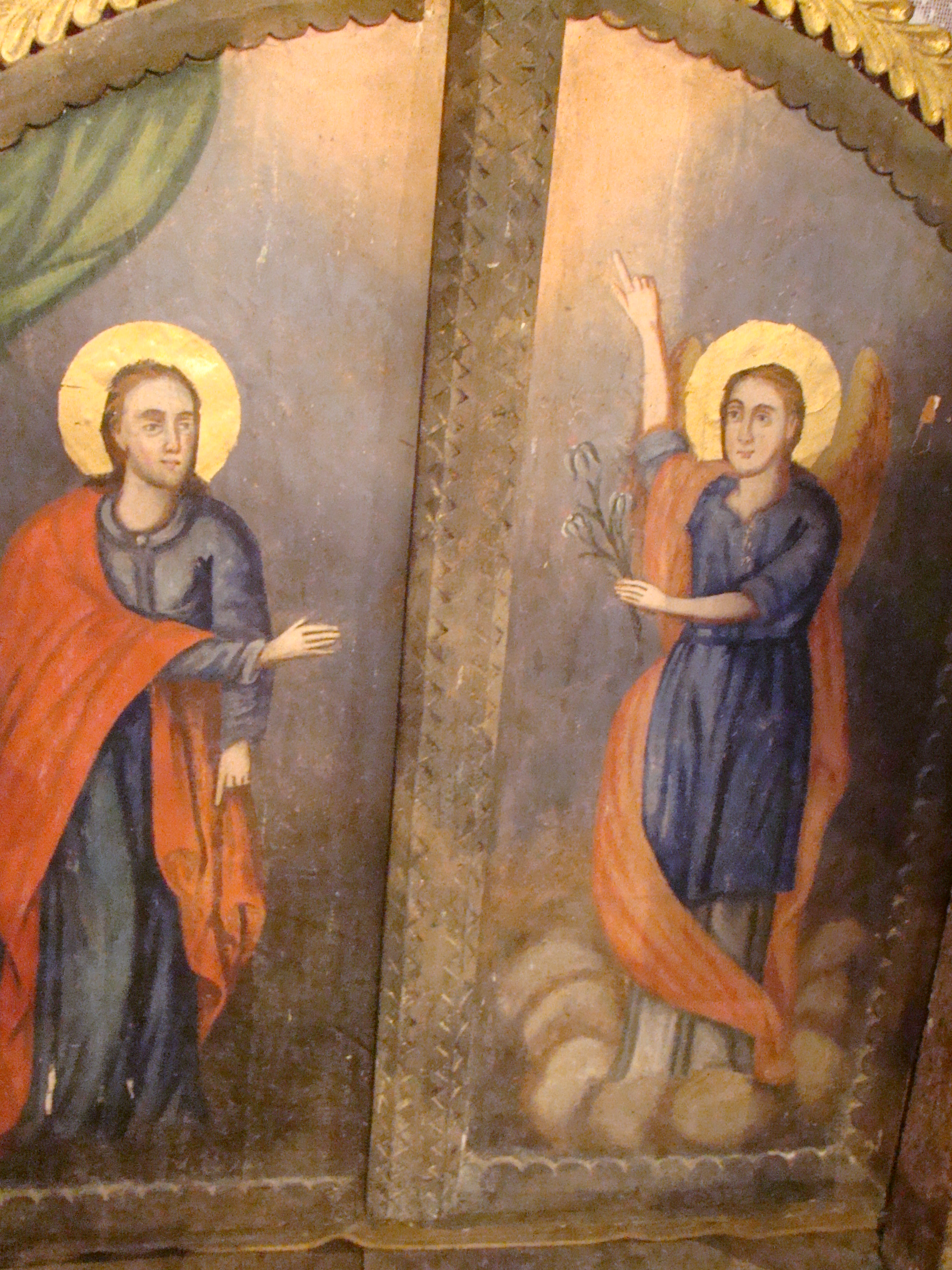 Biserica de lemn din Cristești-Arad